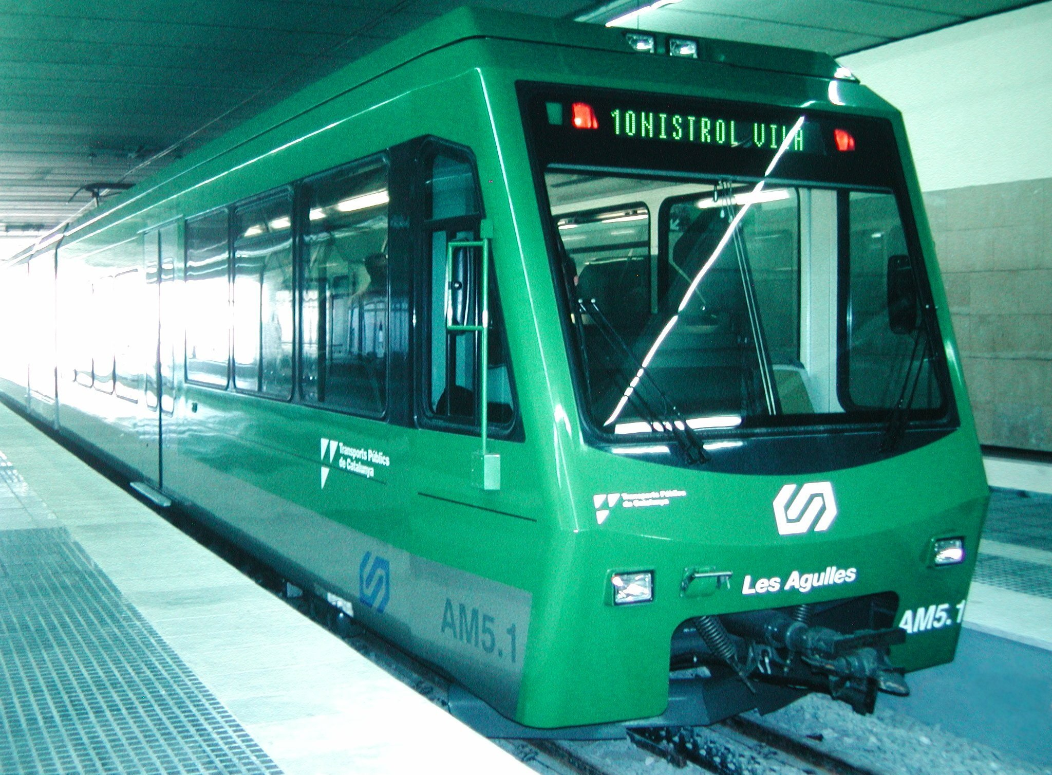 Tandradbaan te Montserrat (Spanje), Categorie:Wikipedia:Afbeeldingen/Gebruiker:P.H. Louw Categorie:Afbeelding trein